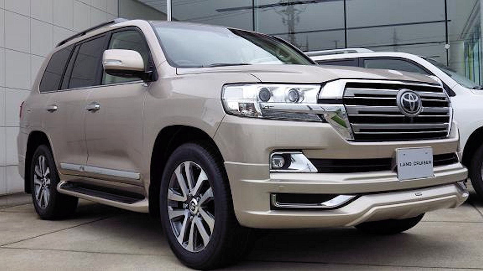 トヨタ・ランドクルーザー200 ZX（オプション装着車）